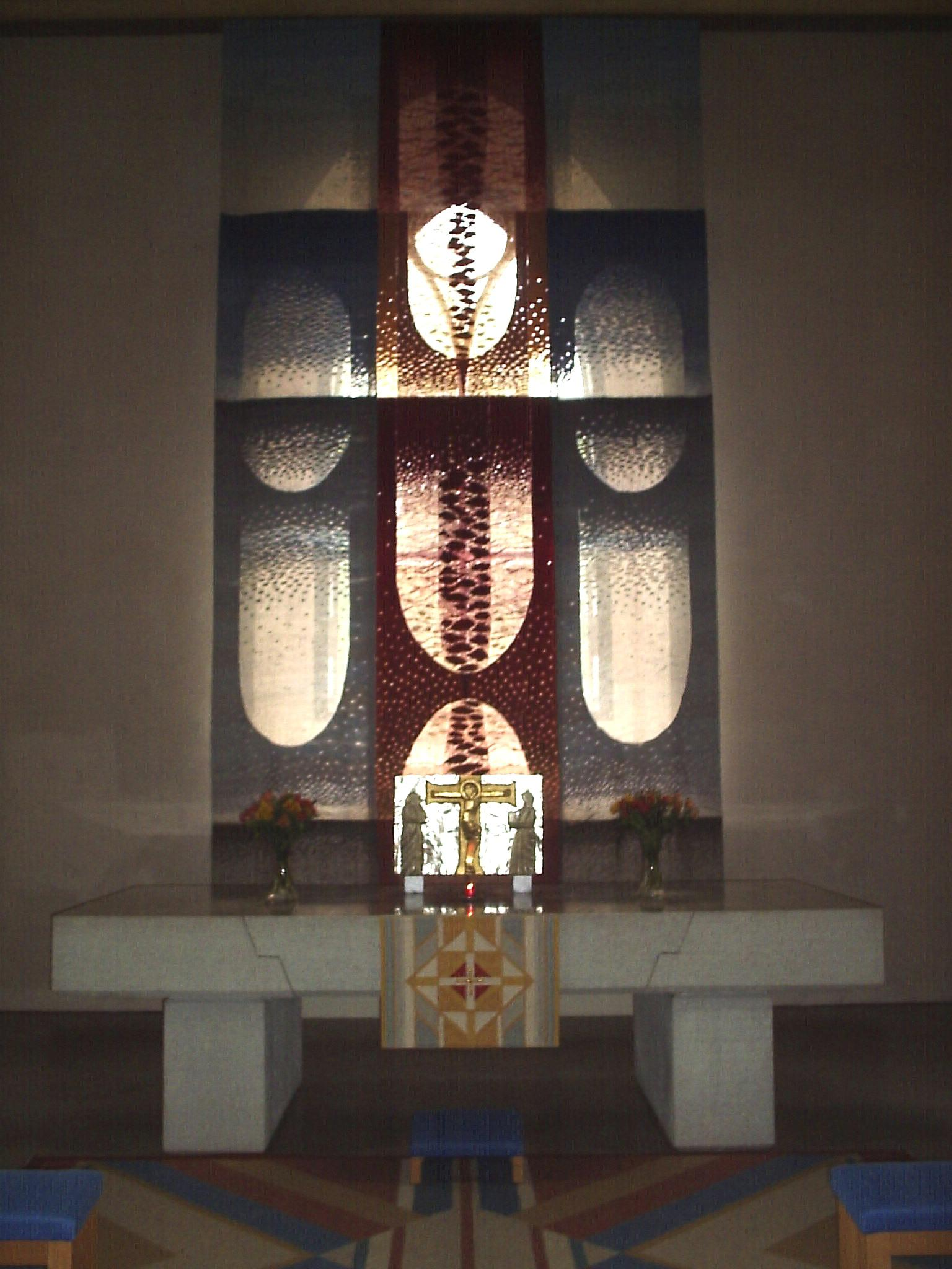 Bilden är fotograferad av Harri Blomberg. Photo by Harri Blomberg.